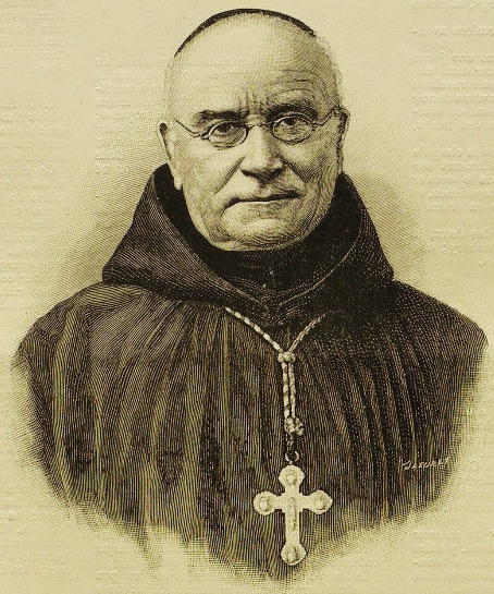 Louis-Charles Couturier